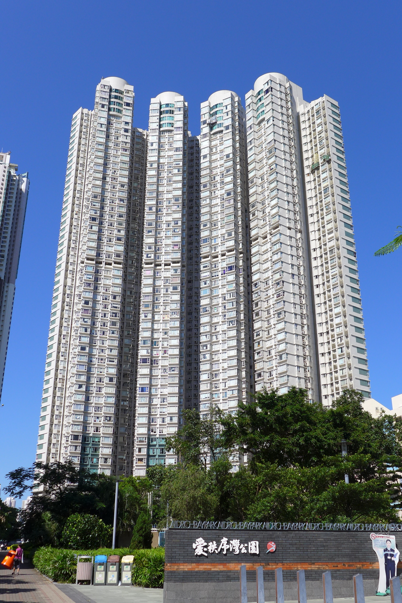 Les Saison